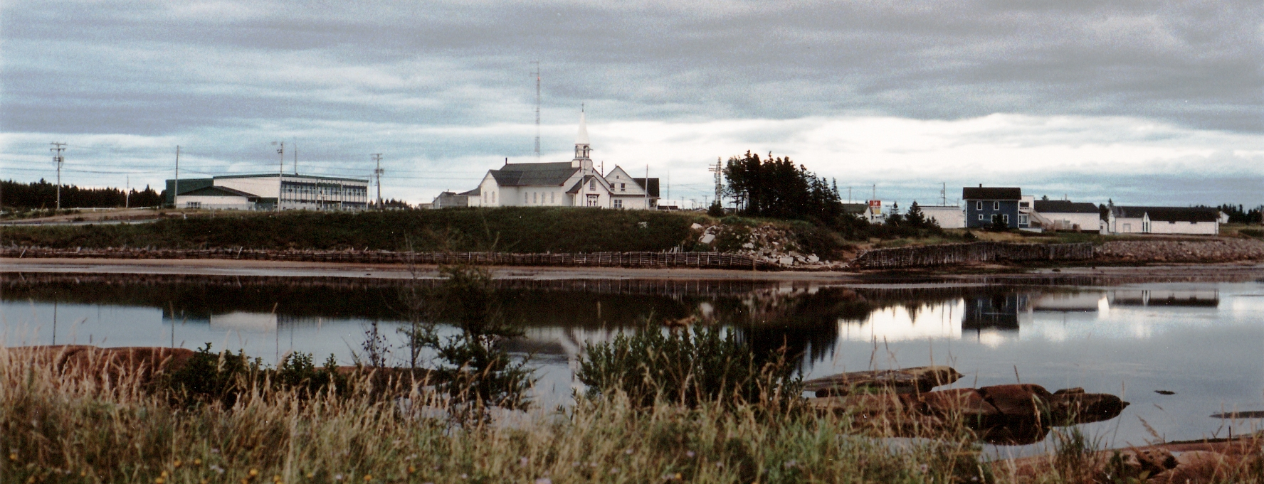 Natashquan 1999